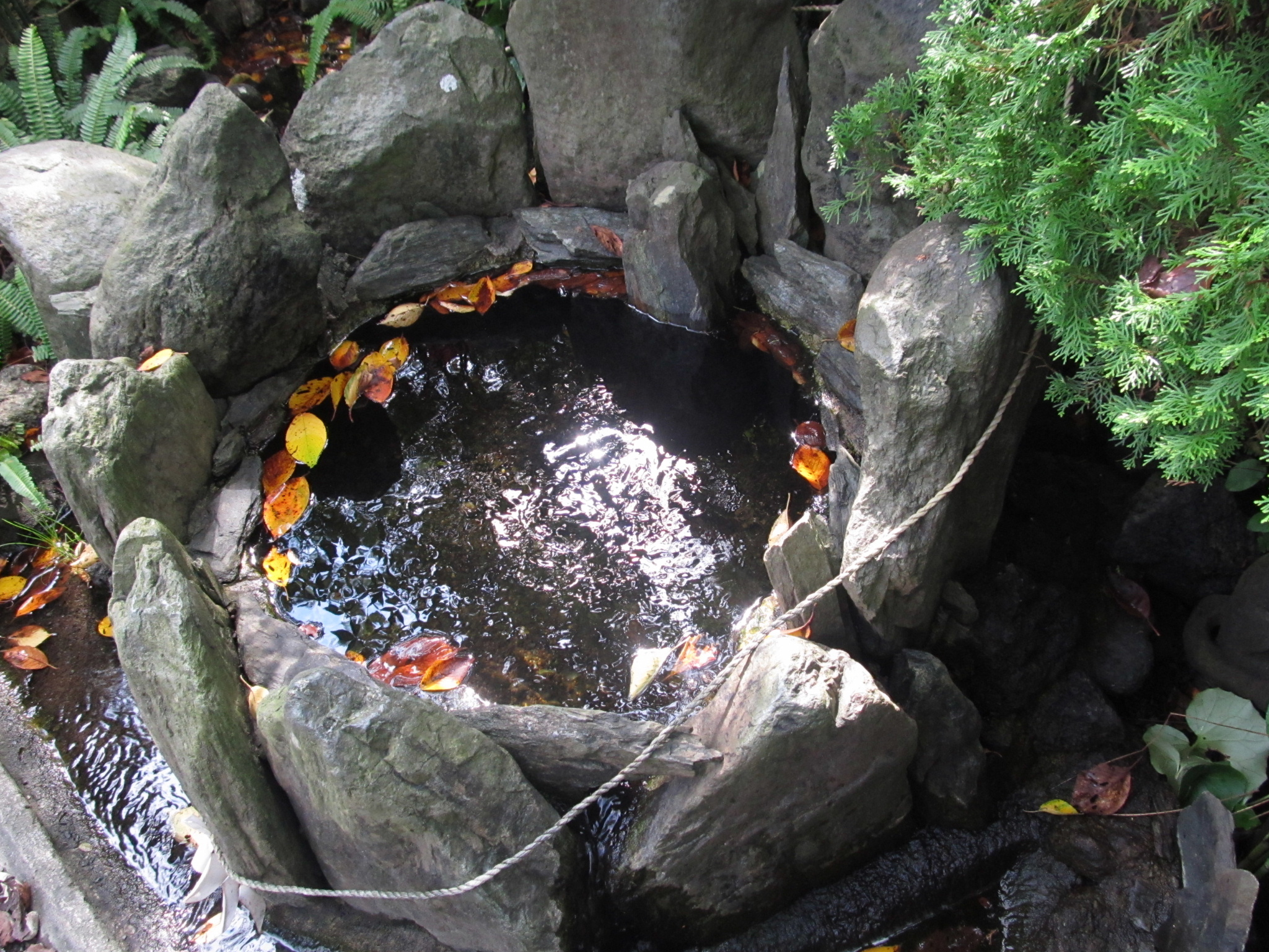 神奈川県藤沢市にある鵠沼伏見稲荷神社の和貴水。